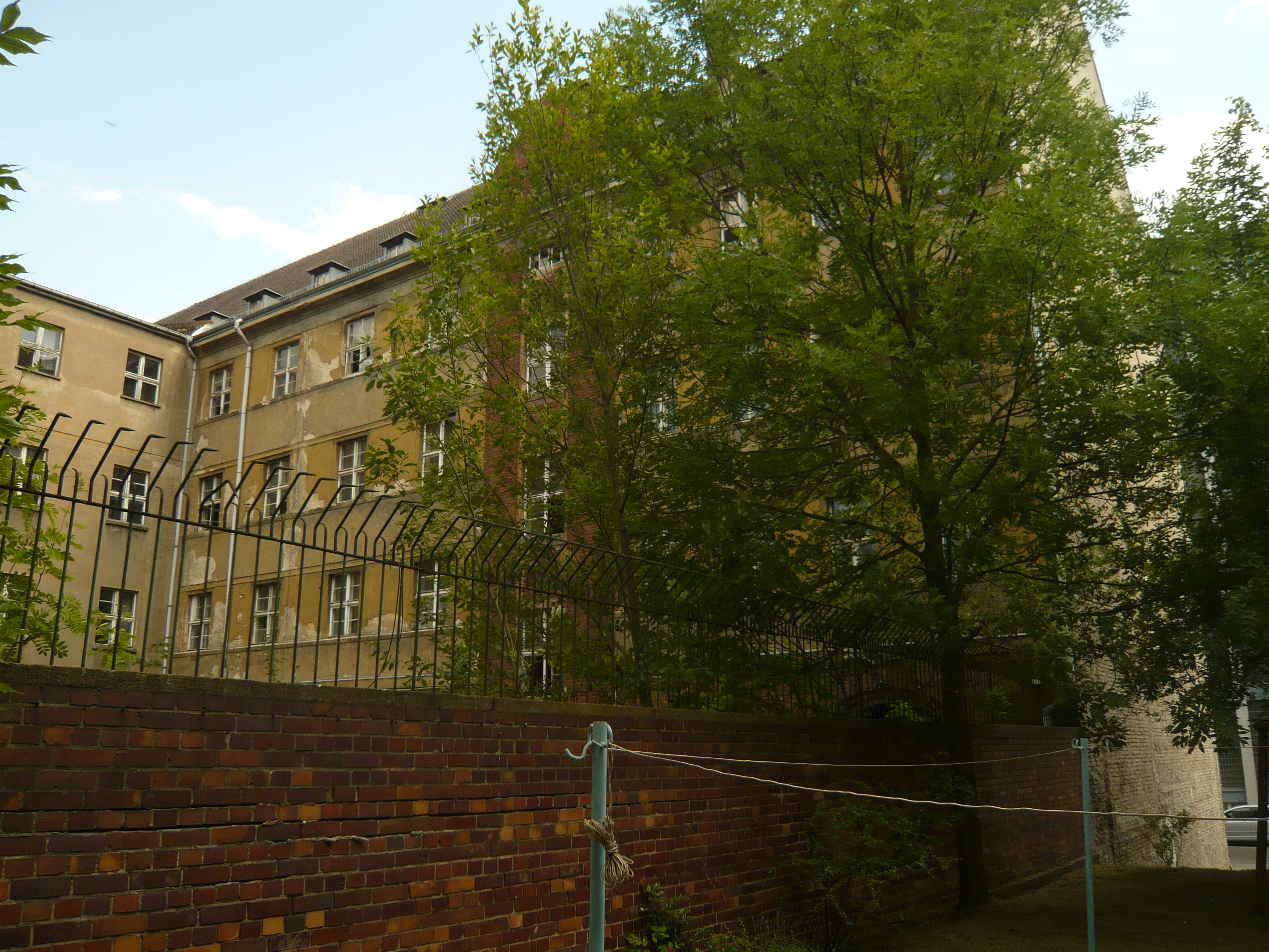 Berlin-Lichtenberg: Dottistraße, histor. Postamt, Rückseite